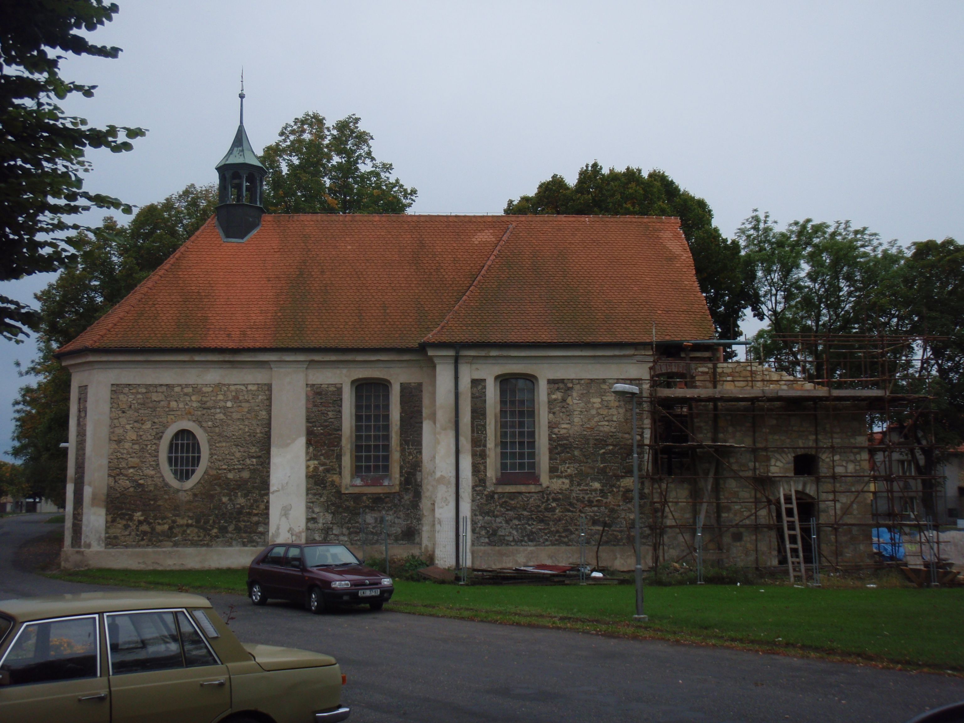 Kostel sv. Šimona a Judy, farní (Lenešice), Lenešice, boční pohled ze severní strany, přední část kostela rozpadlá - opravuje se